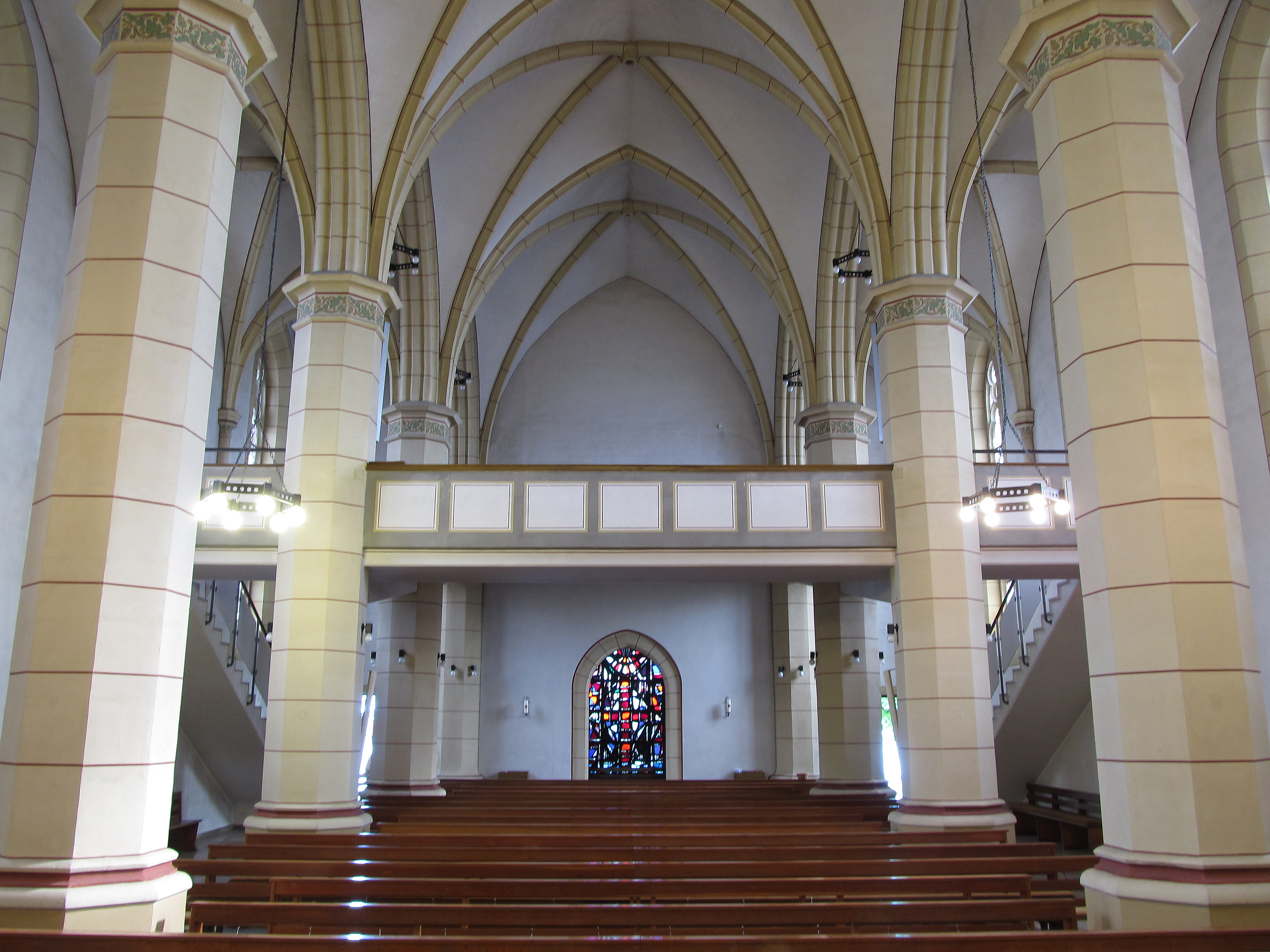 Blick ins Innere der katholischen Pfarrkirche St. Eligius in Burbach, einem Stadtteil der saarländischen Landeshauptstadt Saarbrücken